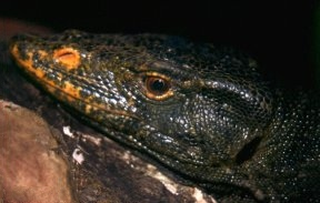 Varanus olivaceus